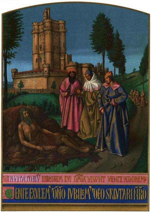 "Miniature de Jehan Foucquet. Chromolithographie publiée par M. Curmer."